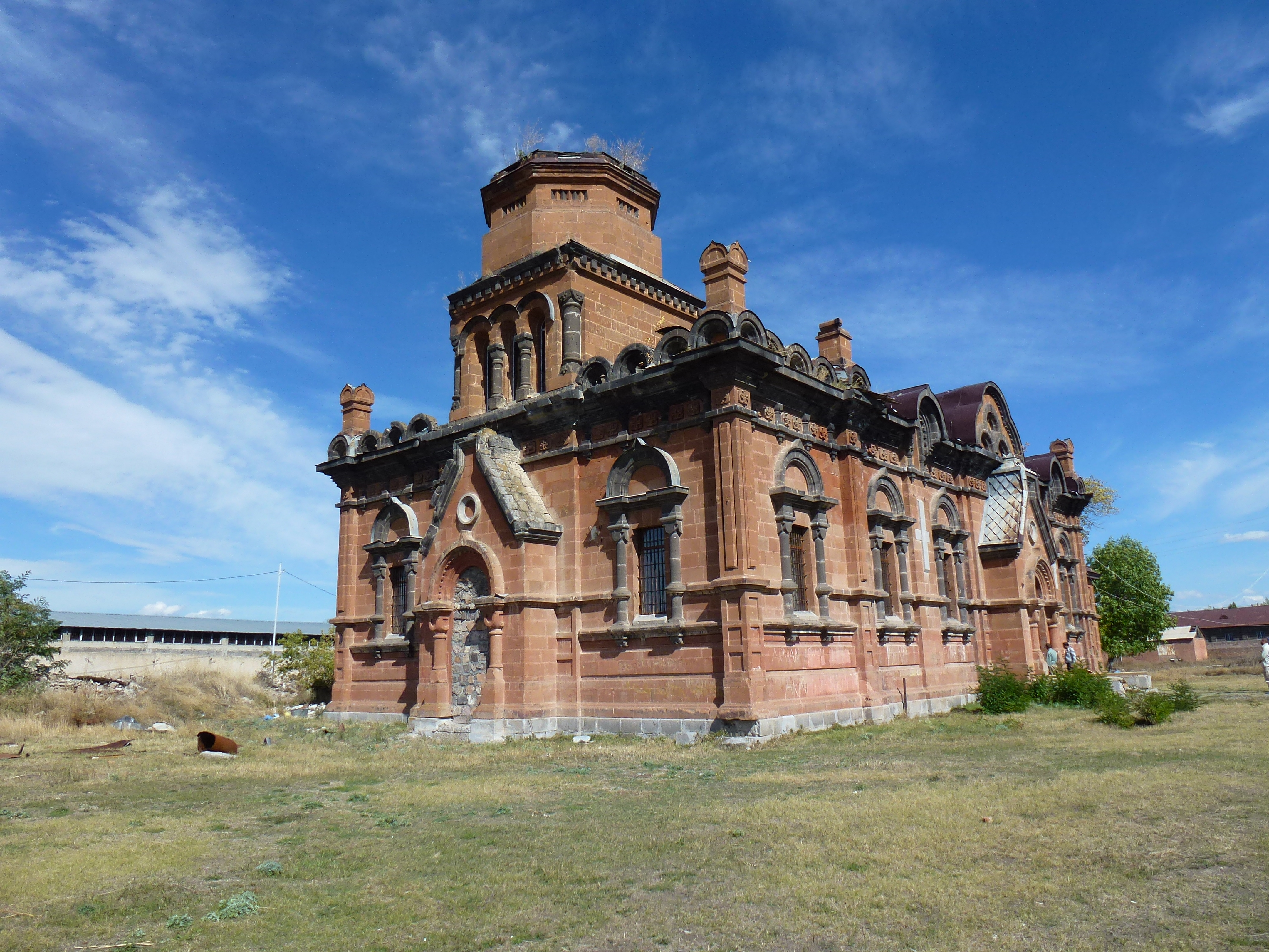 Կազաչի պոստի եկեղեցին Գյումրիում 1/16.5